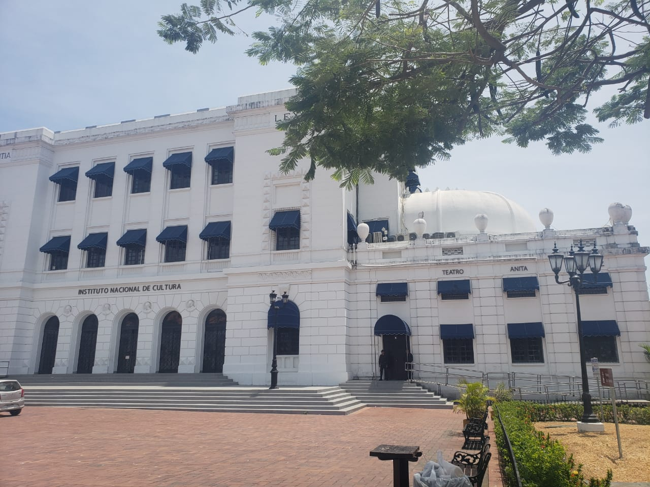 El teatro Anita Villalaz es de uso cultural para obras, danzas y peliculas.